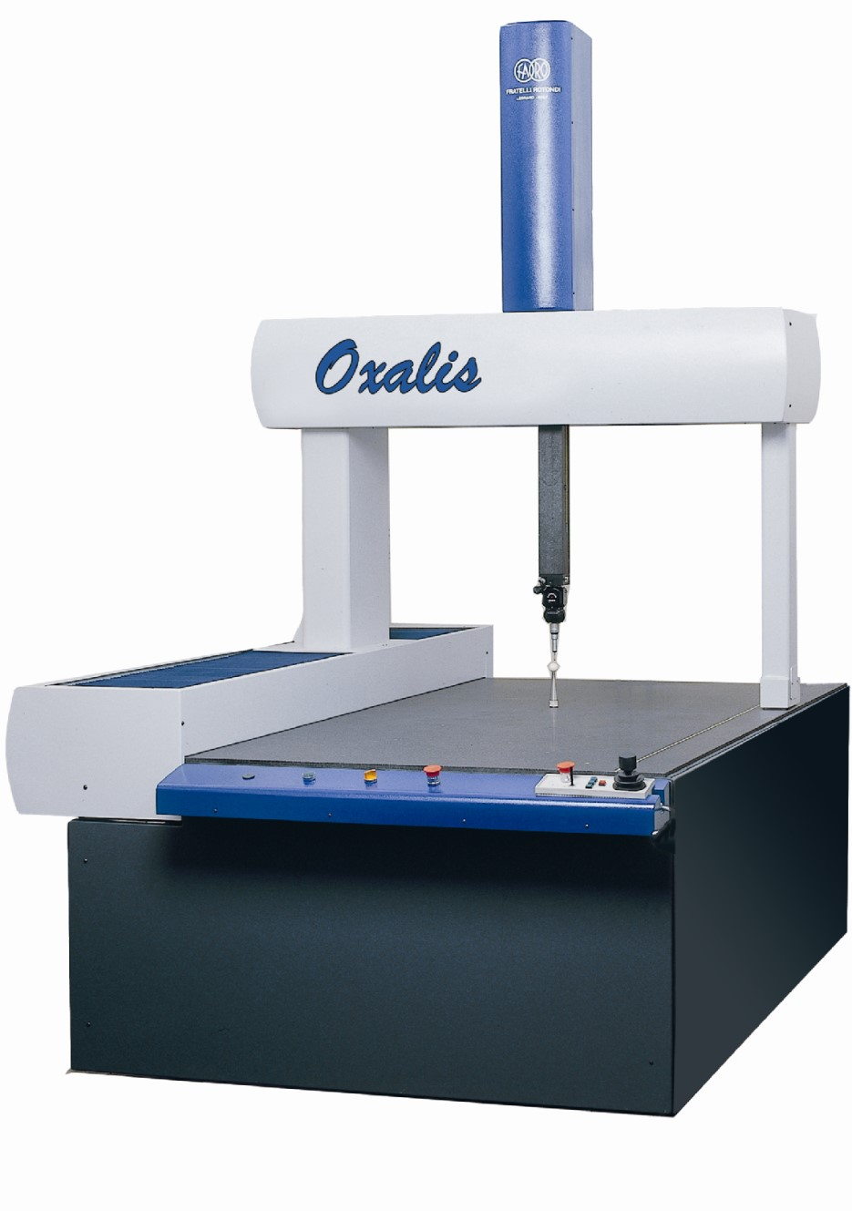 Classico esempio di macchina di misura 3D a portale mobile.